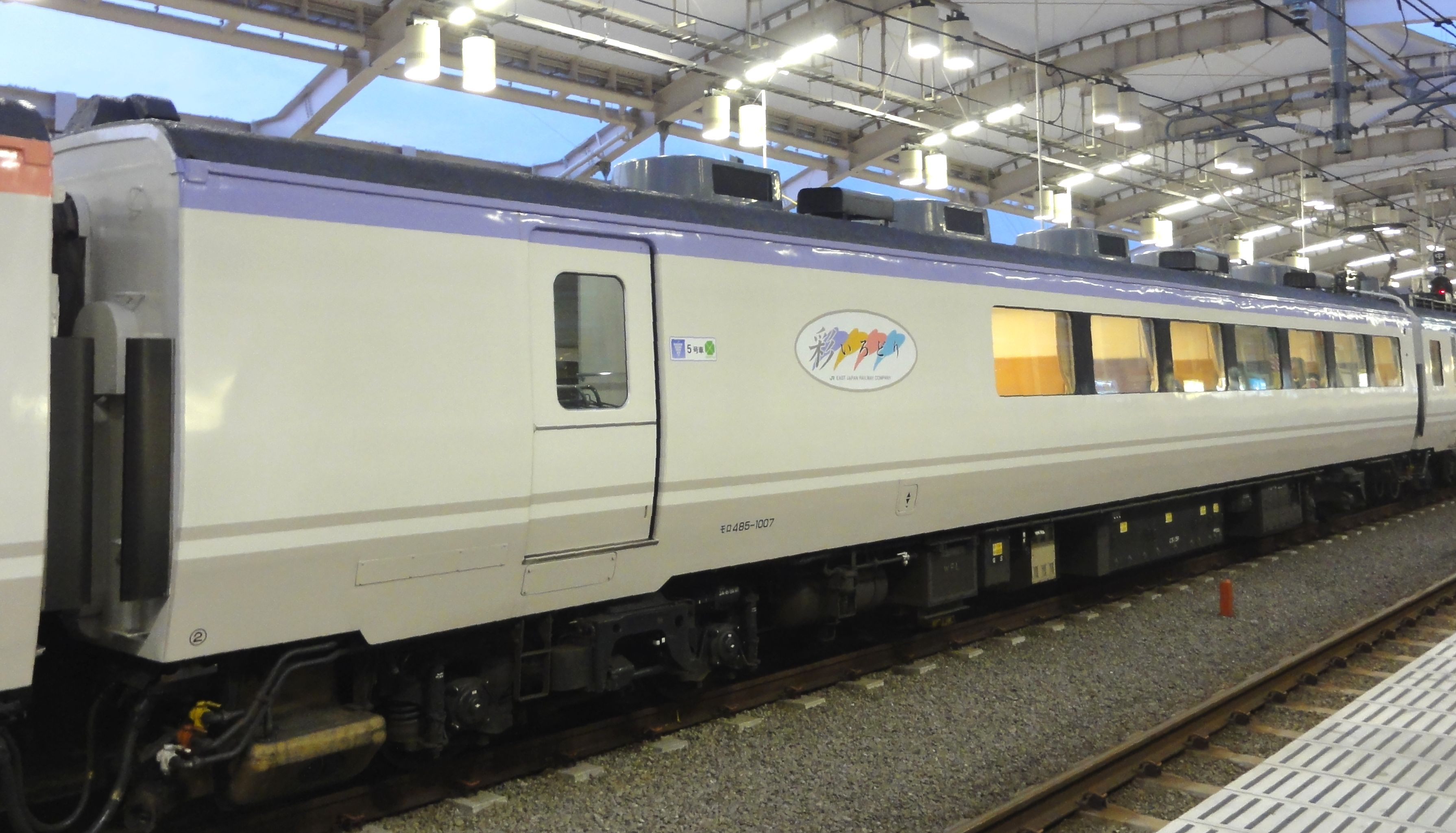 JR東日本 485系「彩（いろどり）」